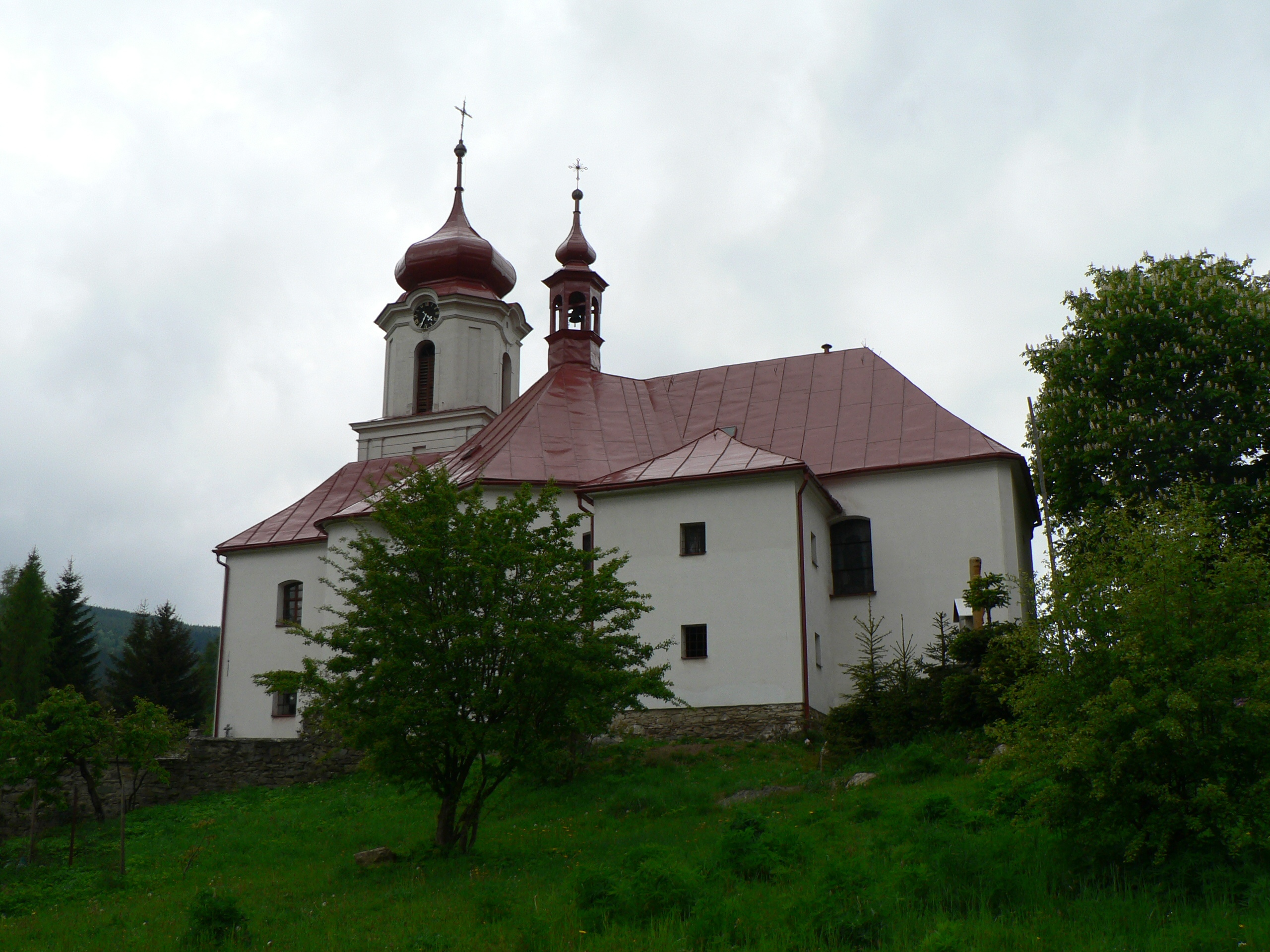 Kostel svatého Jana Křtitele (Nová Seninka)